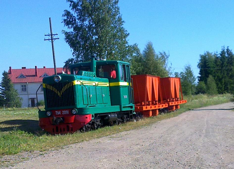 dieselveturi ja soravaunuja